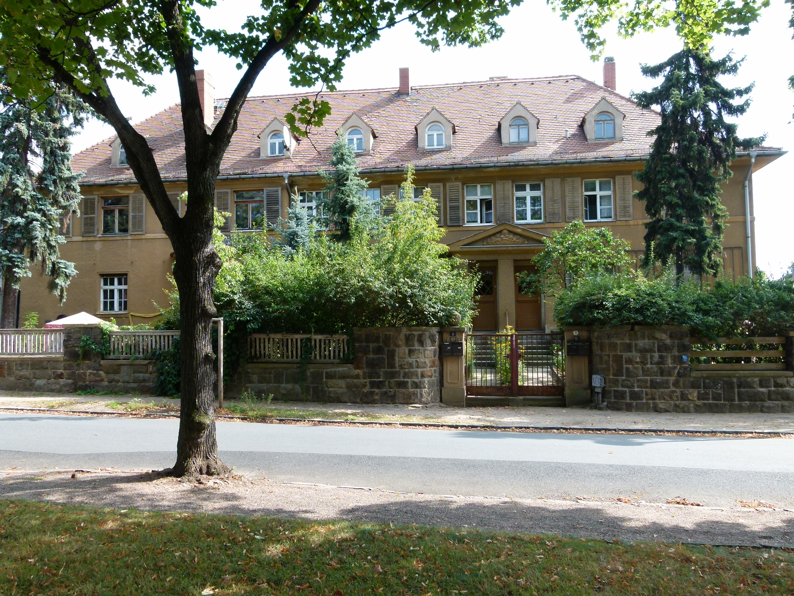 Denkmalgeschütztes Haus, Rosa-Luxemburg-Platz 2-3, Radebeul, Sachsen